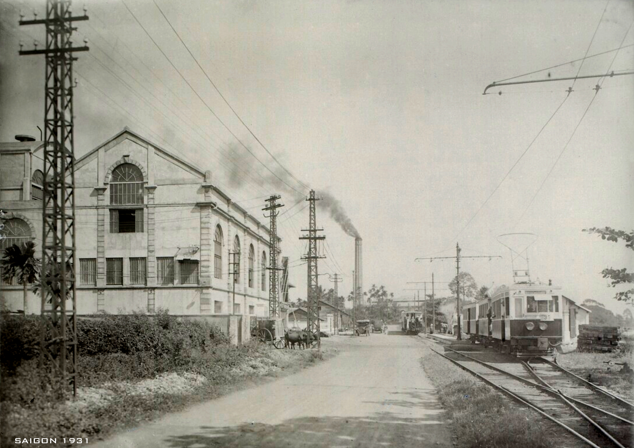 Tramway des CFTI devant le centre radio-électrique de Saïgon, à la bifurcation de Choquan